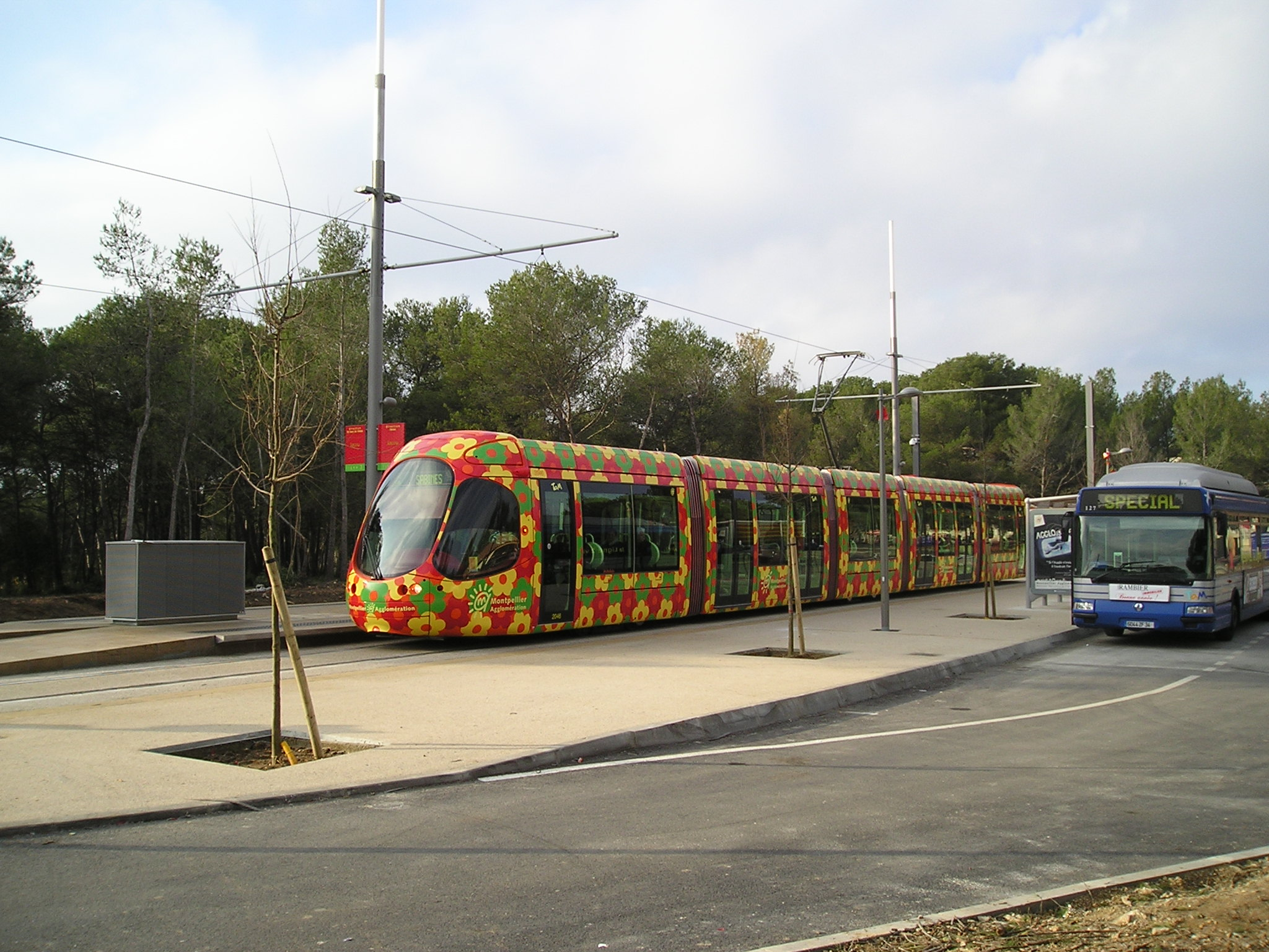 Une rame stationnant au terminus Jacou de la ligne 2 du tramway de Montpellier. Sur la droite, un bus aux couleurs des Transports de l'agglomération de Montpellier. Autre vue de la même scène : Image:Jacou Rame Terminus Tram2 27122006.JPG.